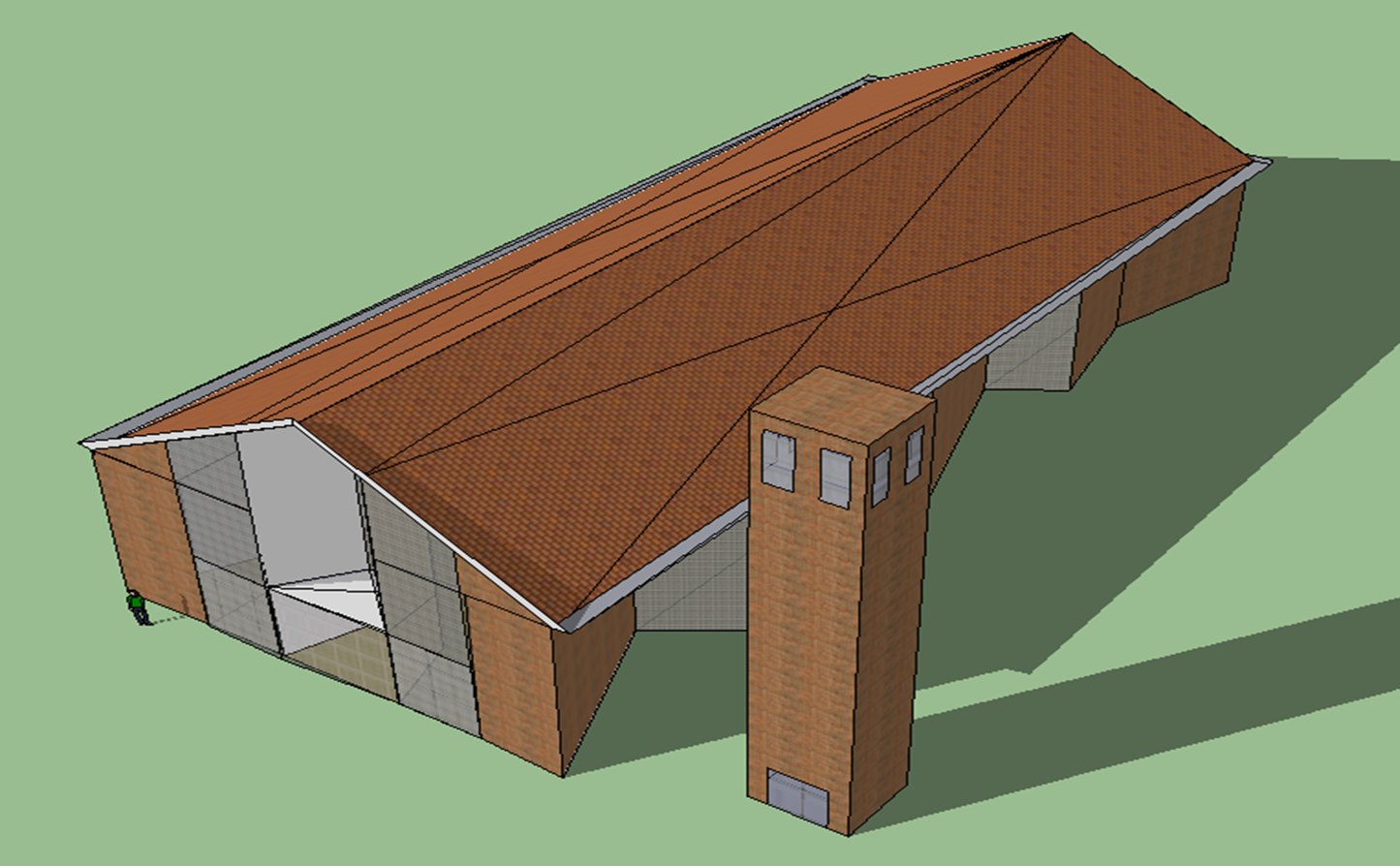 vista general